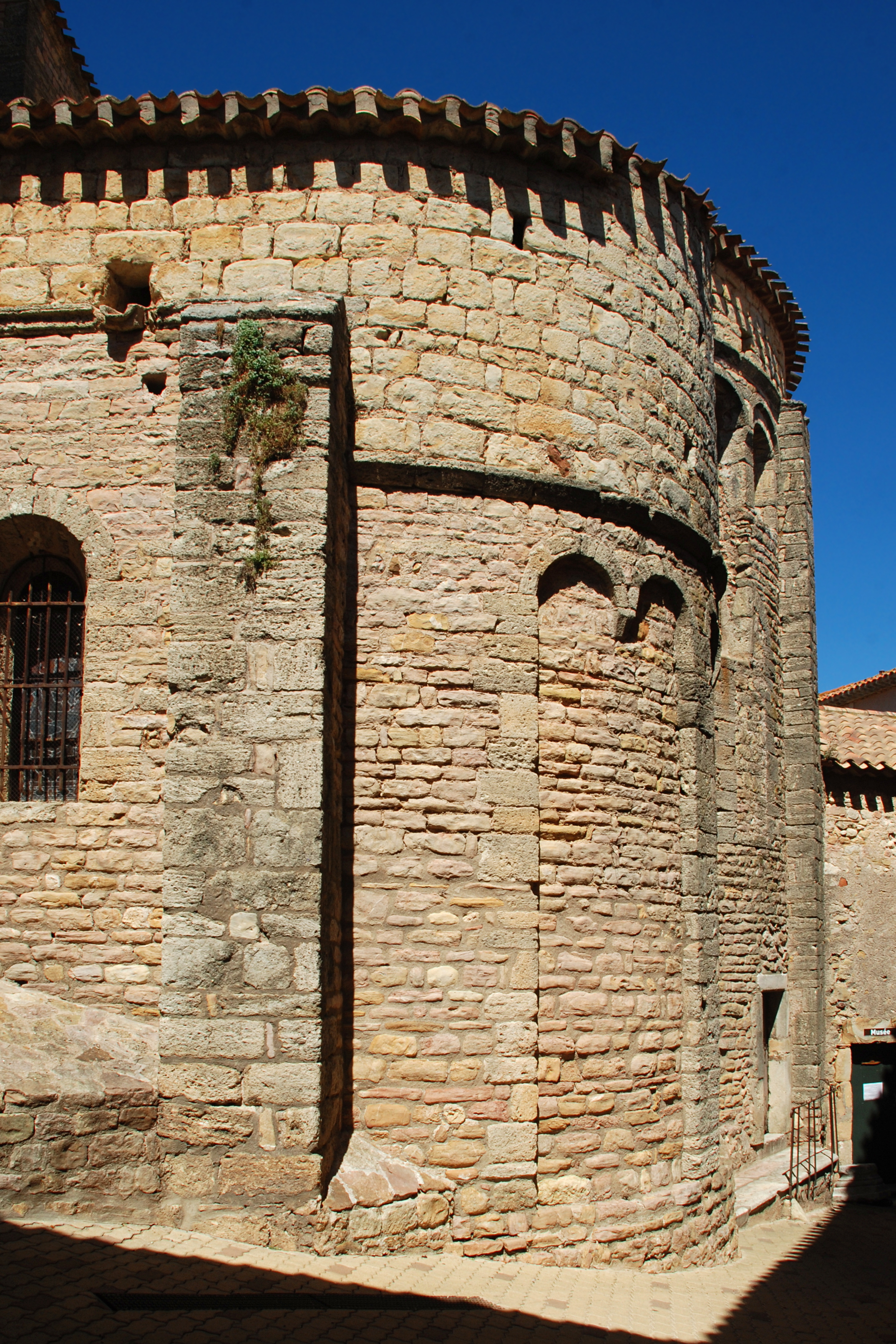 France - Languedoc - Hérault - Église Sainte-Marie de Quarante .